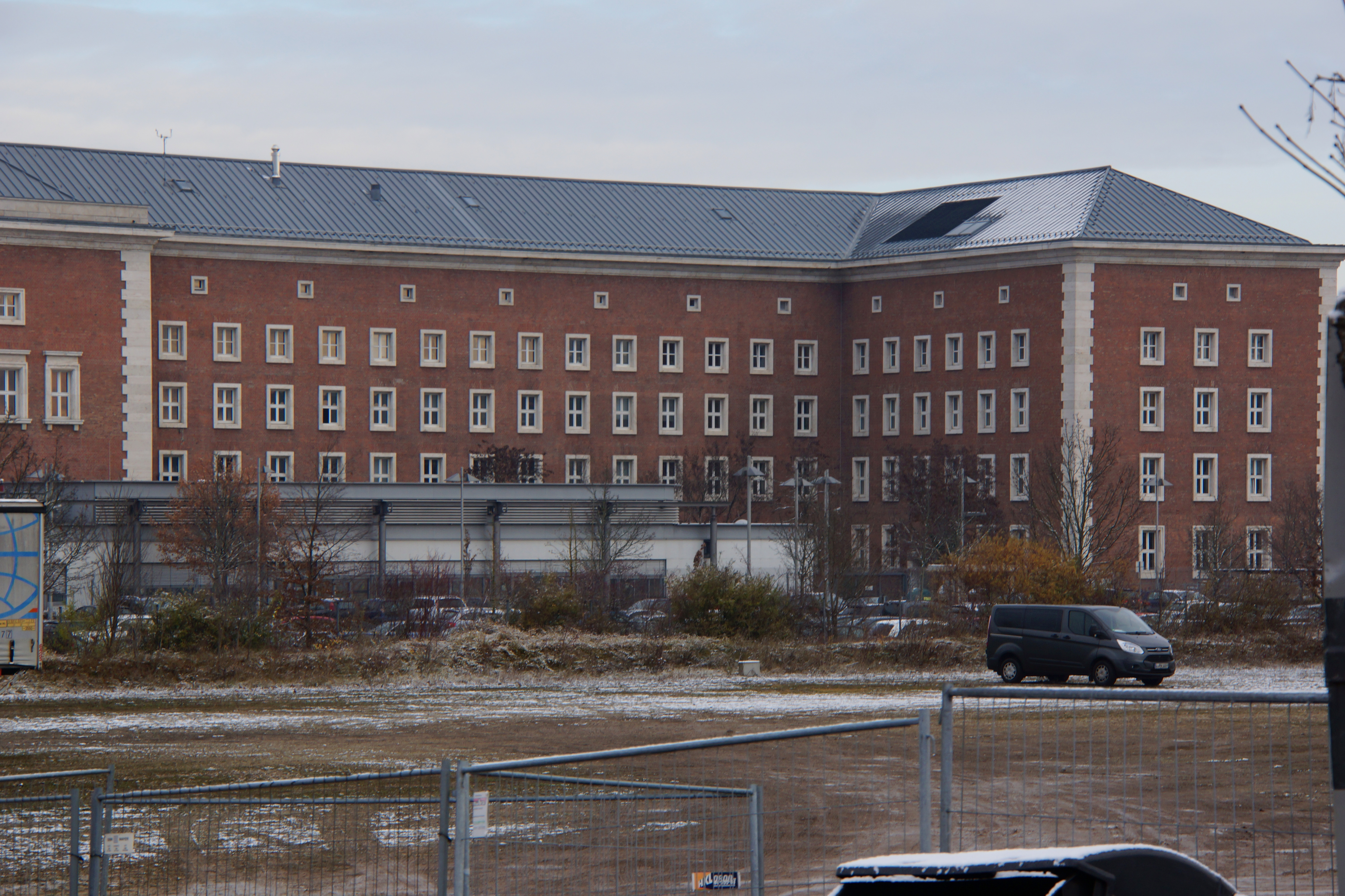 Die ehemalige SS-Kaserne von Süden. Sie wird gegenwärtig vom Bundesamt für Migration und Flüchtlinge genutzt